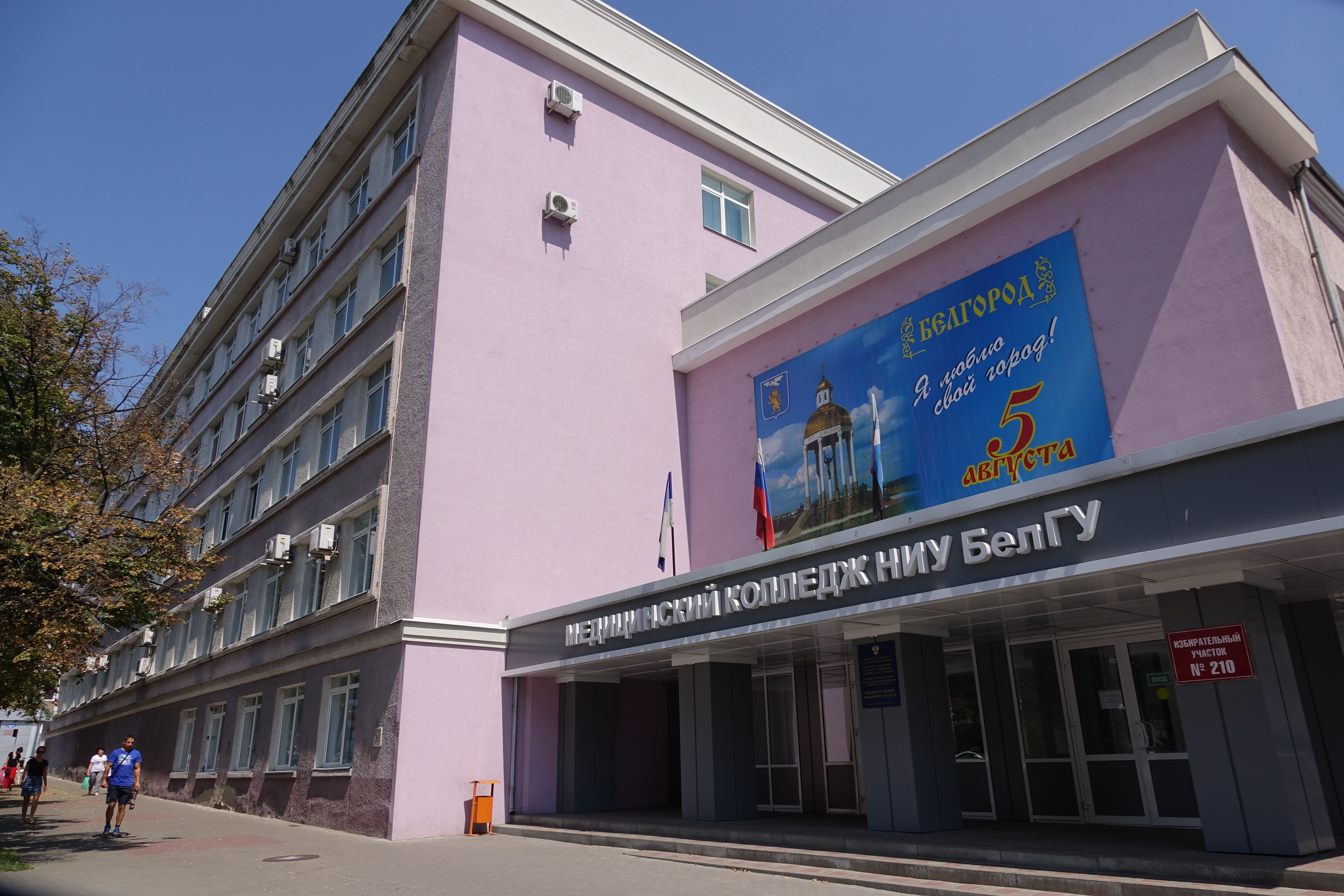 Медицинский колледж Белгородского государственного национального исследовательского университета